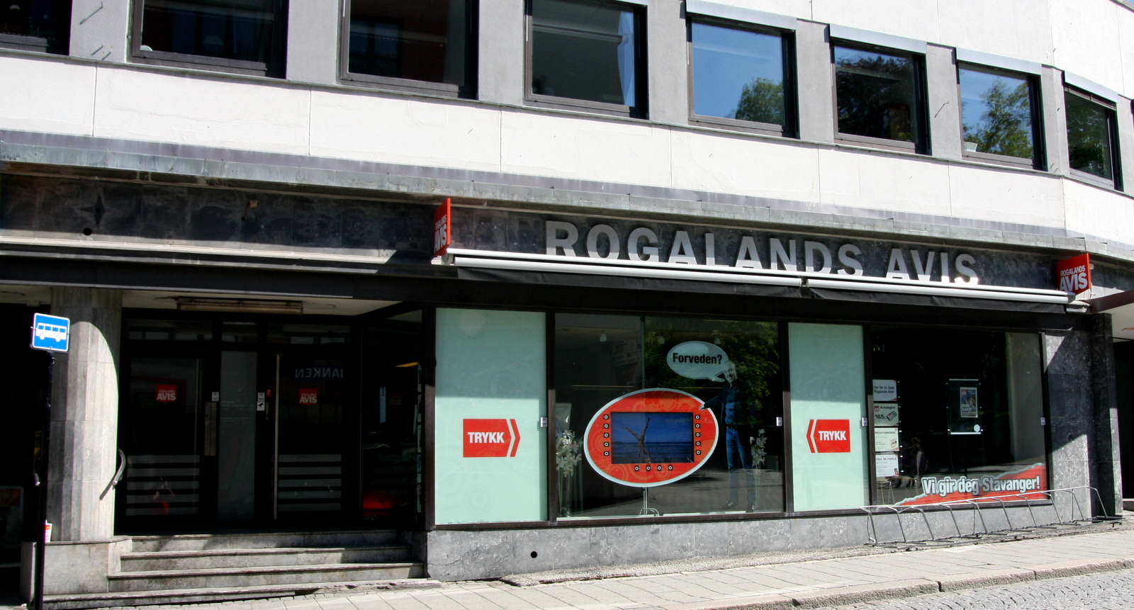 Rogalands Avis